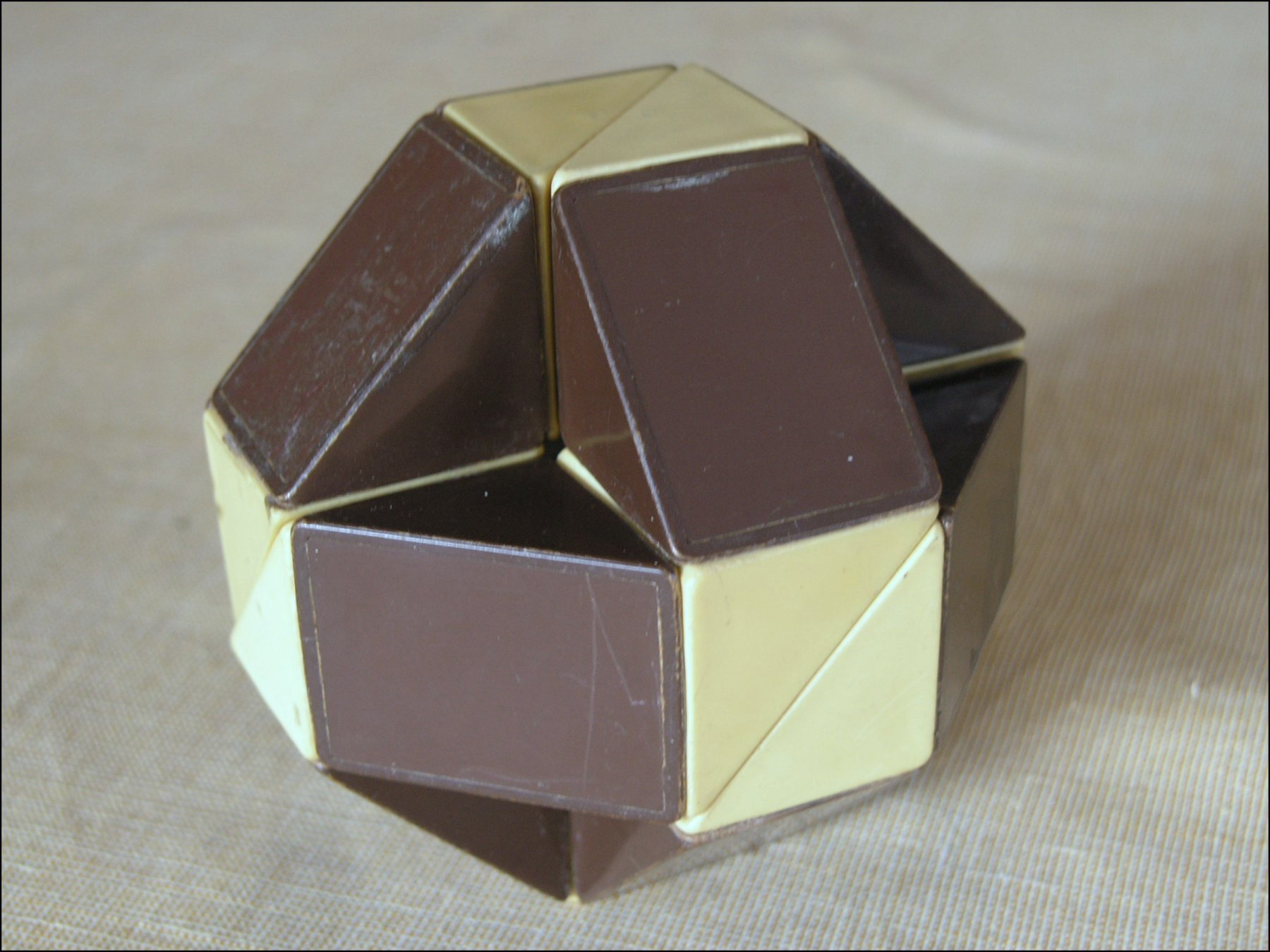 Rubik's Snake